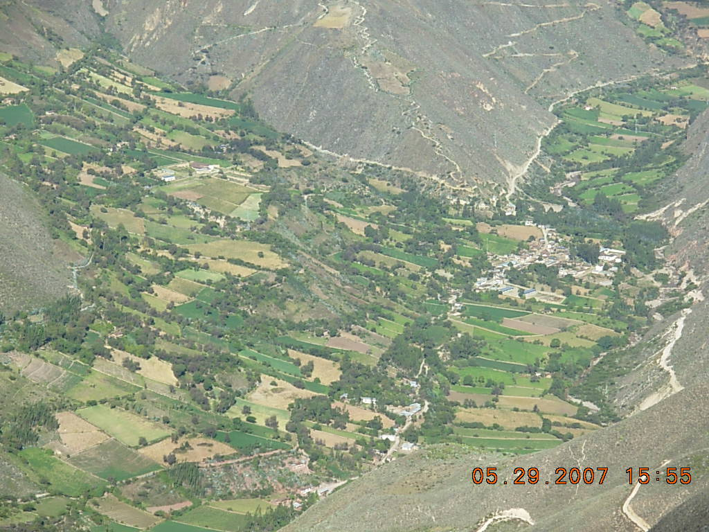 Esta foto fue proporcionada por Abilio Dominguez en un viaje inspeccion a Hidrandina